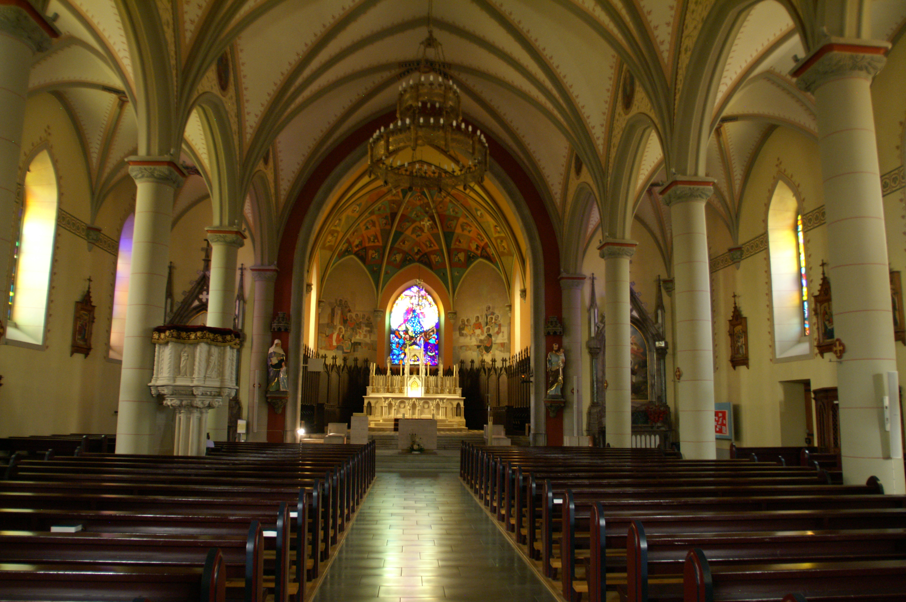 Église Notre-Dame d'Attalens.